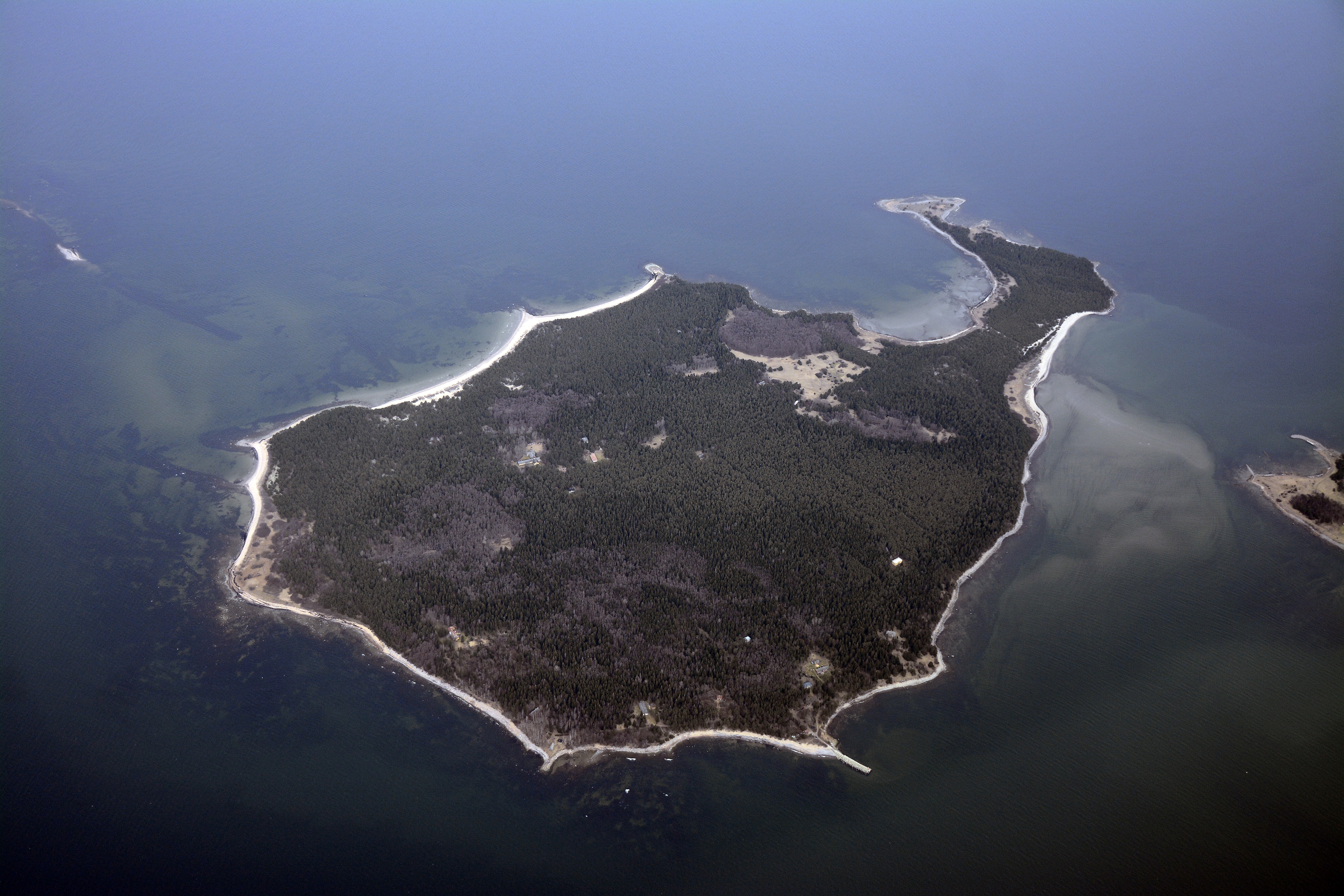 Õhuvaade Aegna saarest